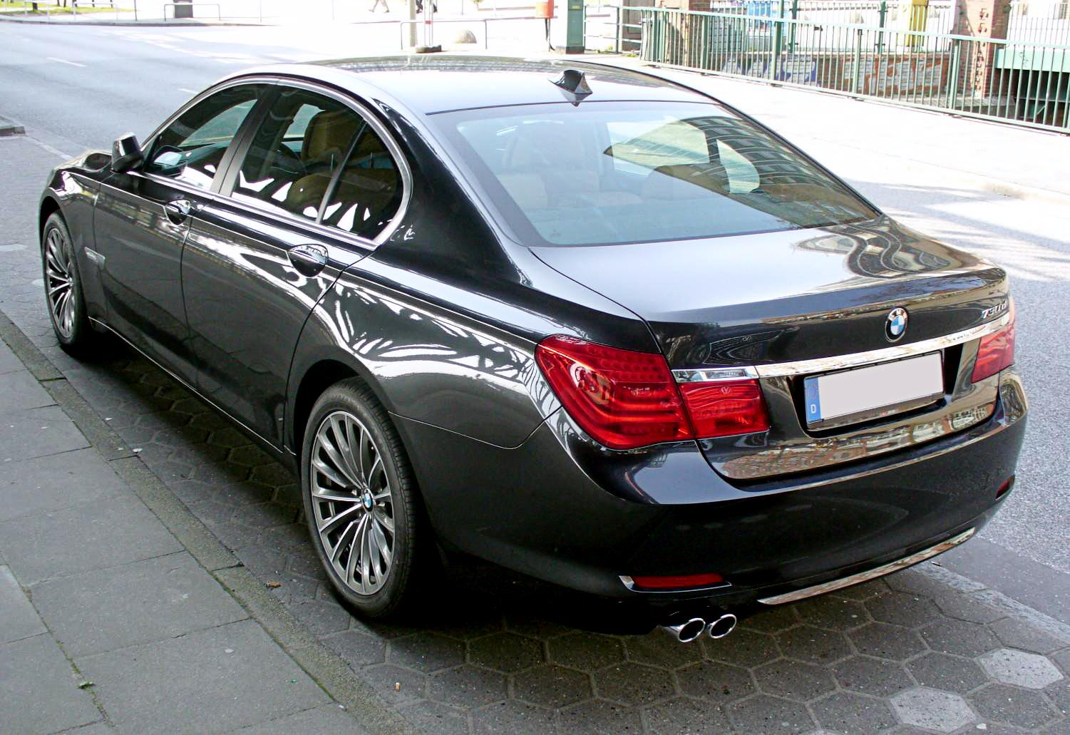 BMW F01